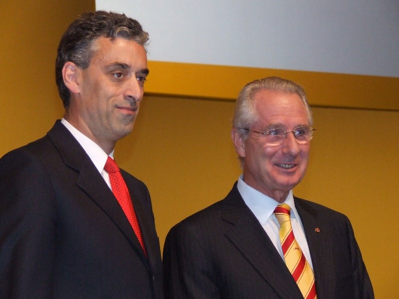 Frank Appel (links) und Klaus Zumwinkel (rechts) auf der Hauptversammlung der Deutschen Post World Net AG in Köln 2007.